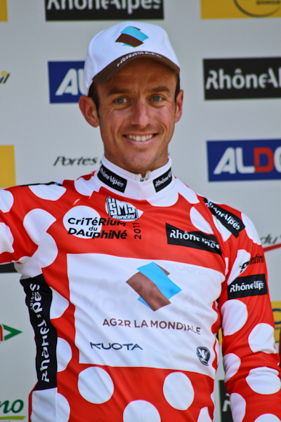 Prologue du Critérium du Dauphiné 2011, Saint Jean de Maurienne